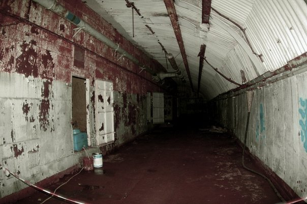 Тоннель УКРАИНА КРЫМ Балаклава БАЗА ПО РЕМОНТУ ПОДВОДНЫХ ЛОДОК